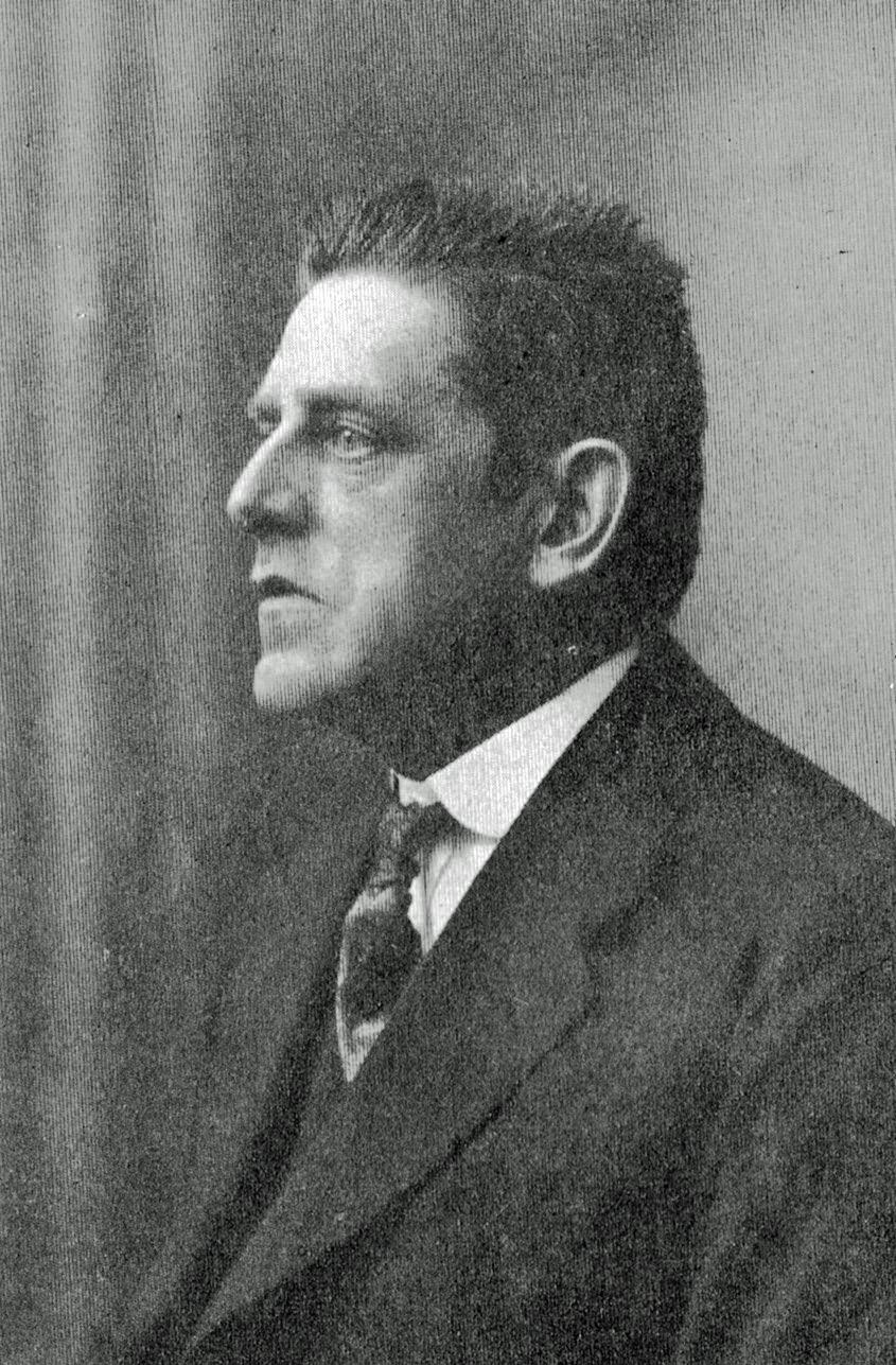 wohl Passfoto des Autors